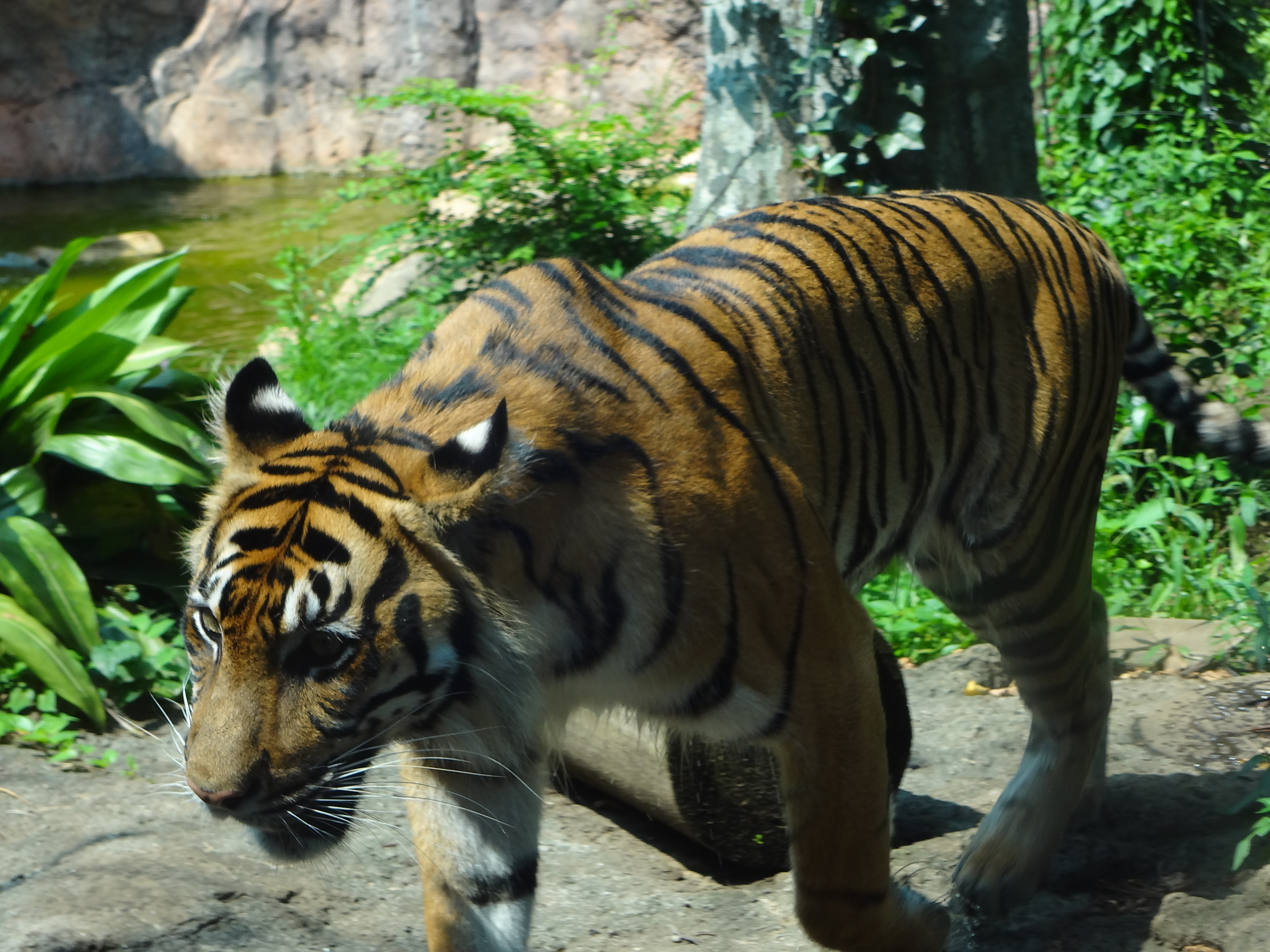 Tiger - Ueno Zoo - Tokyo - Japan